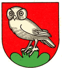 Wappen von Vucherens Kanton Waadt Schweiz